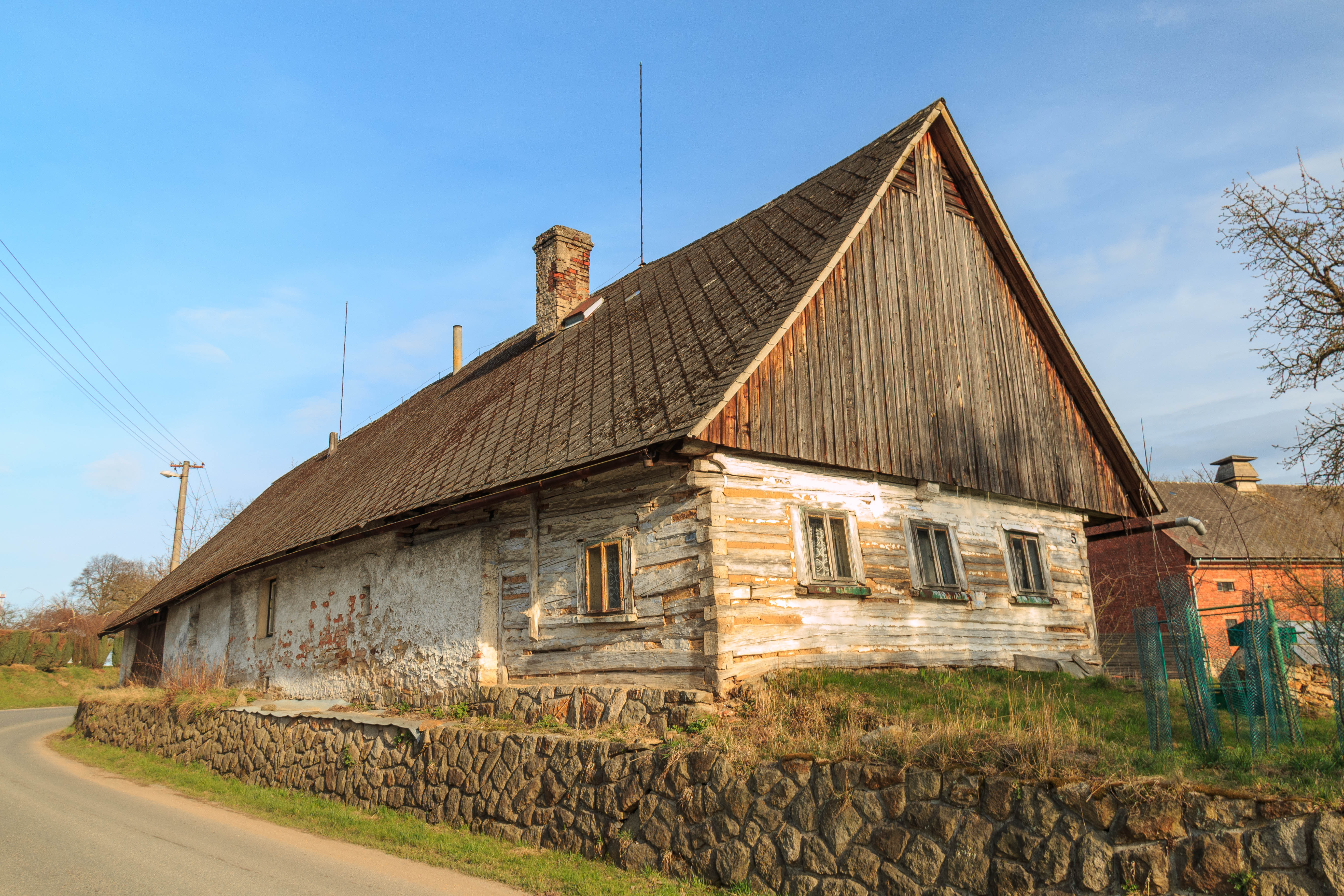 Všeliby čp. 5